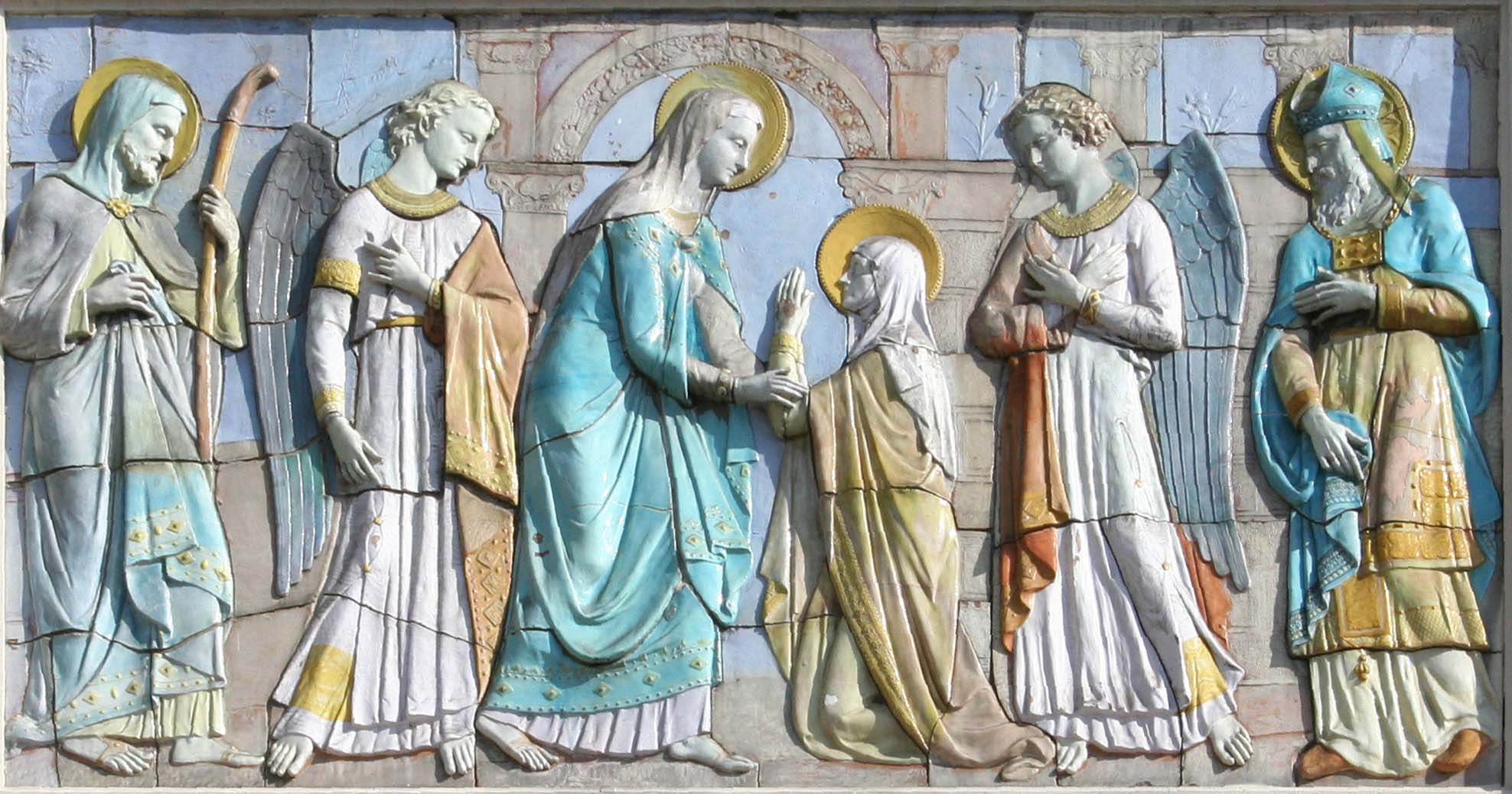 Céramique de la façade de l'église Notre-Dame du Mont à Marseille représentant la visitation.